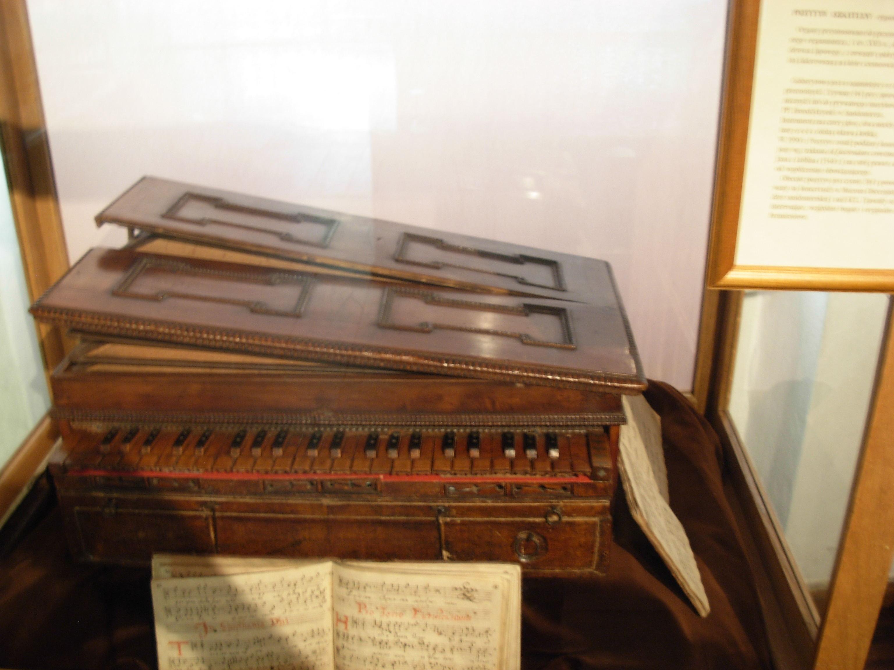 Jan Długosz House in Sandomierz Sandomierz, Poland. Diocesan museum. pozytyw szkatuowy; portable organum mobile, see Image:Muzeum Diecezjalne - 38a.JPG